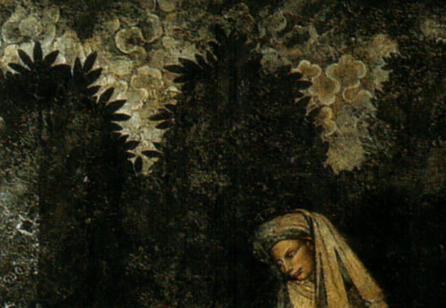 detail